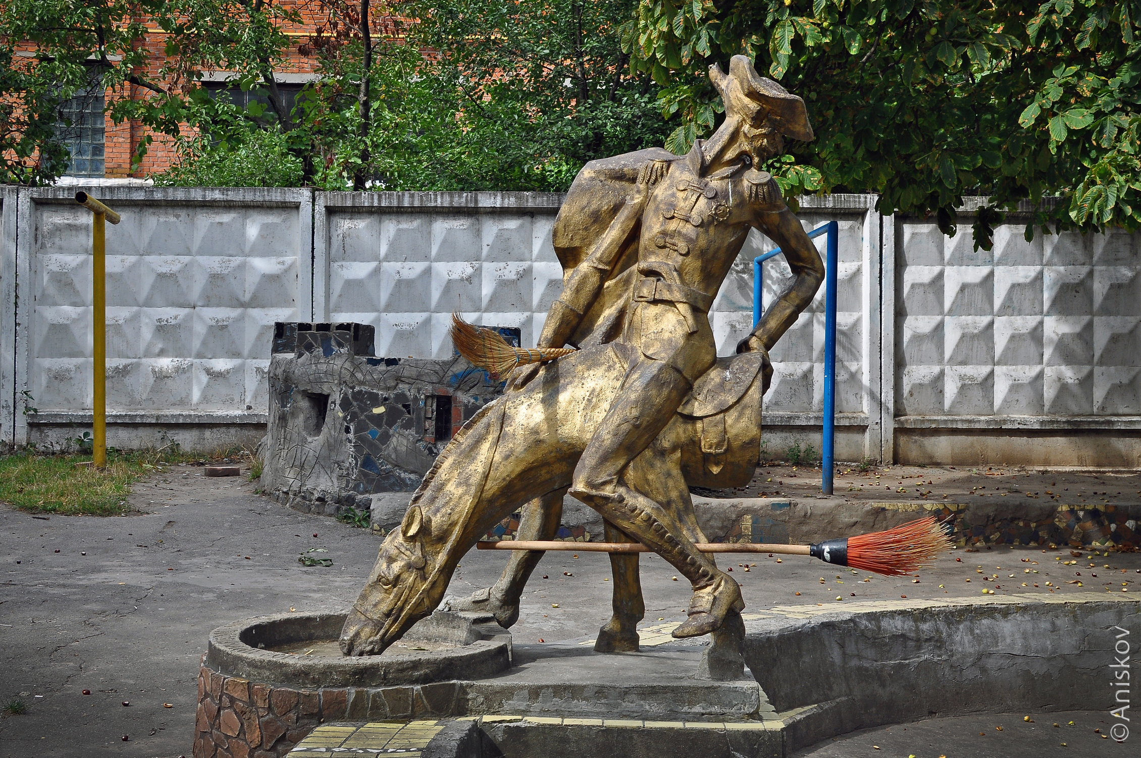 Пам'ятник-фонтан барону Мюнхгаузену м. Хмельницький